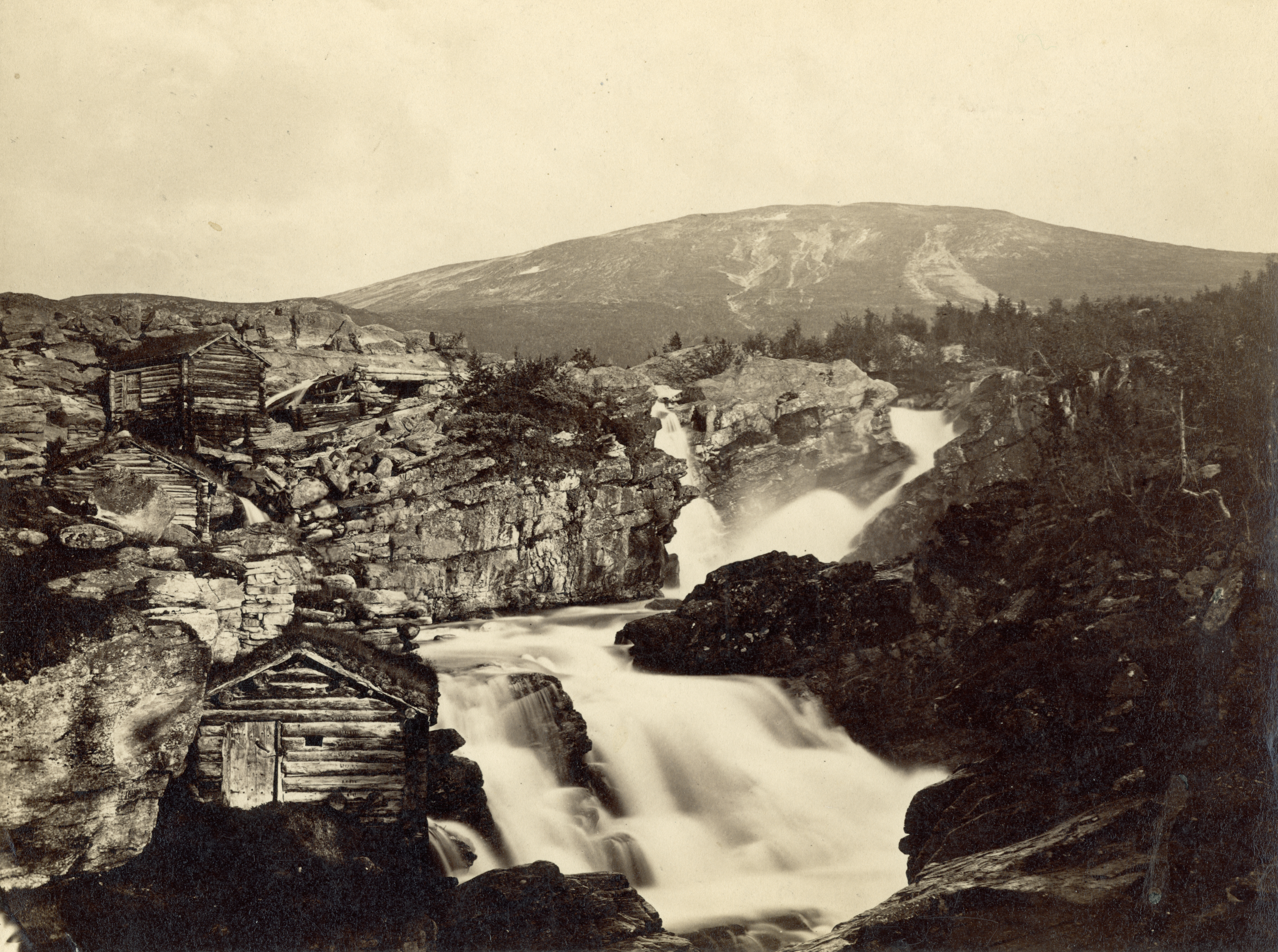 Grønnefossen i Lesjaskog, Oppland Grønnefossen ved mølla